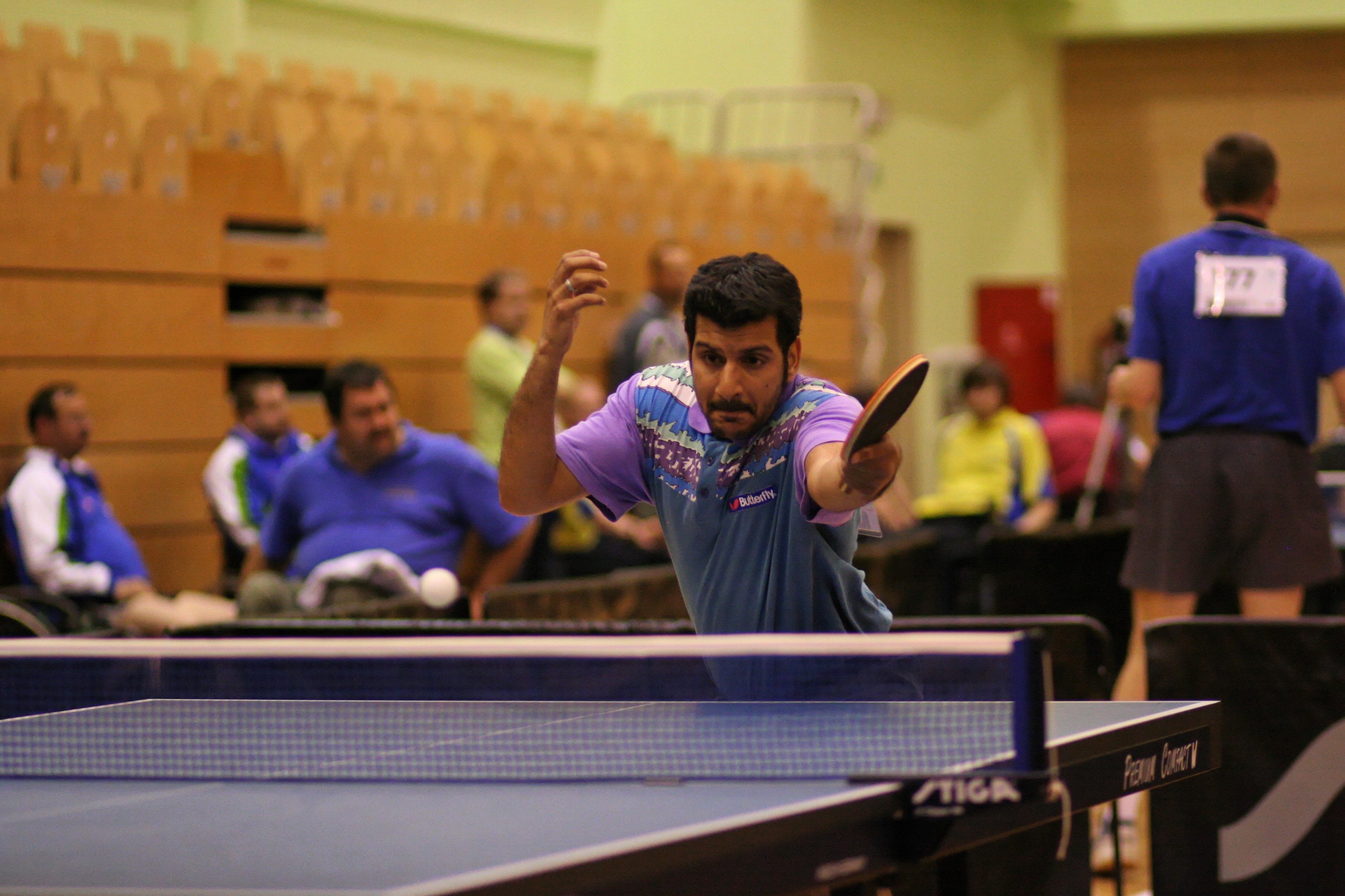 Julien Soyer (FRA) - Kranjska Gora HIT Open